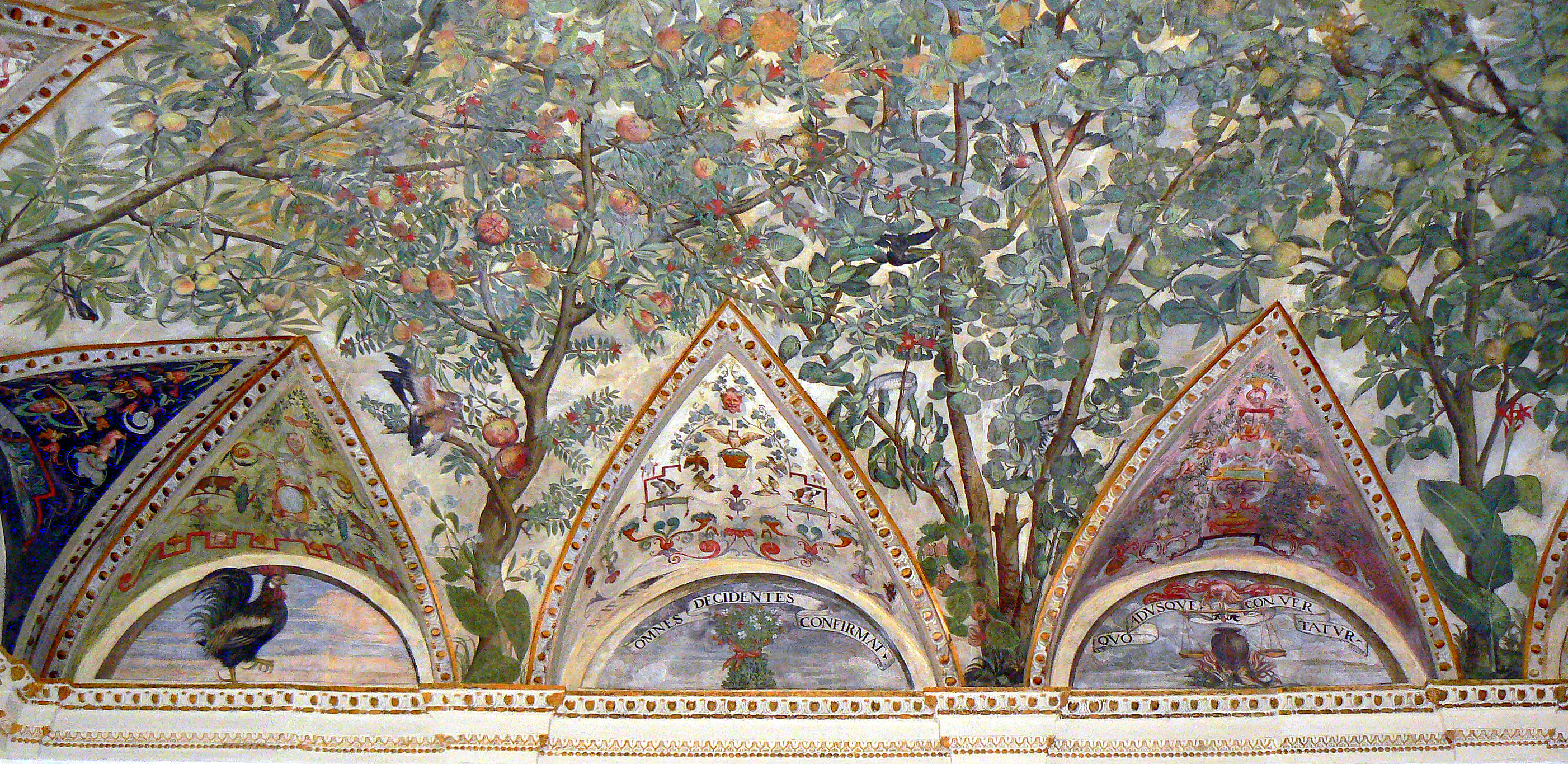 Museo di Palazzo Grimani - MIBAC This is a photo of a monument which is part of cultural heritage of Italy.